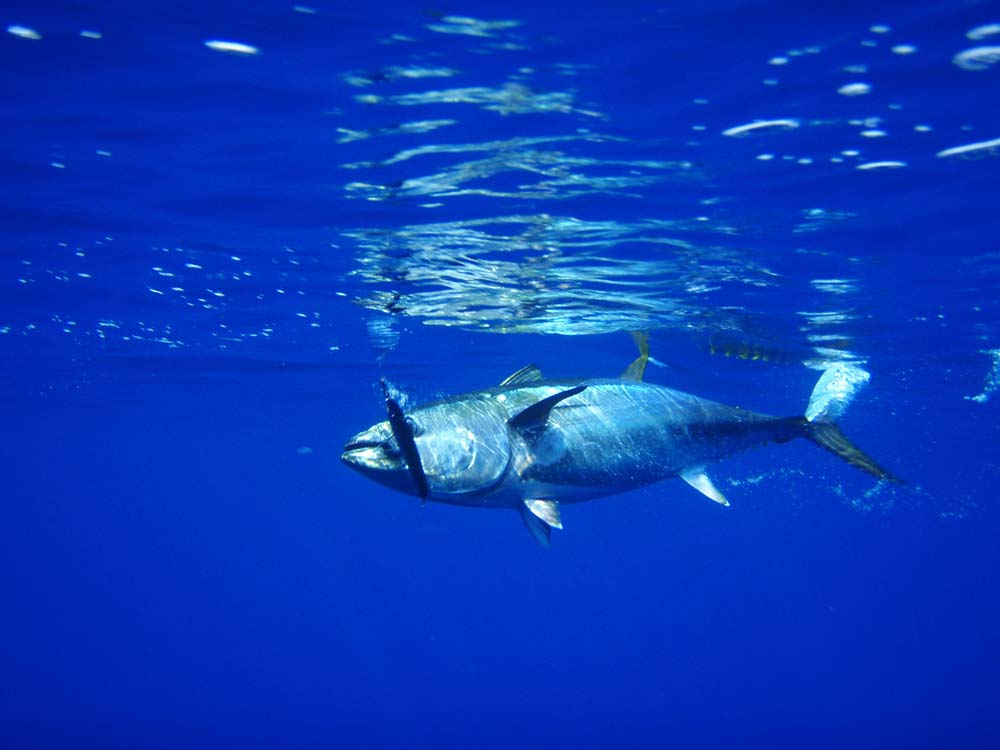 Petit thon pendant le combat